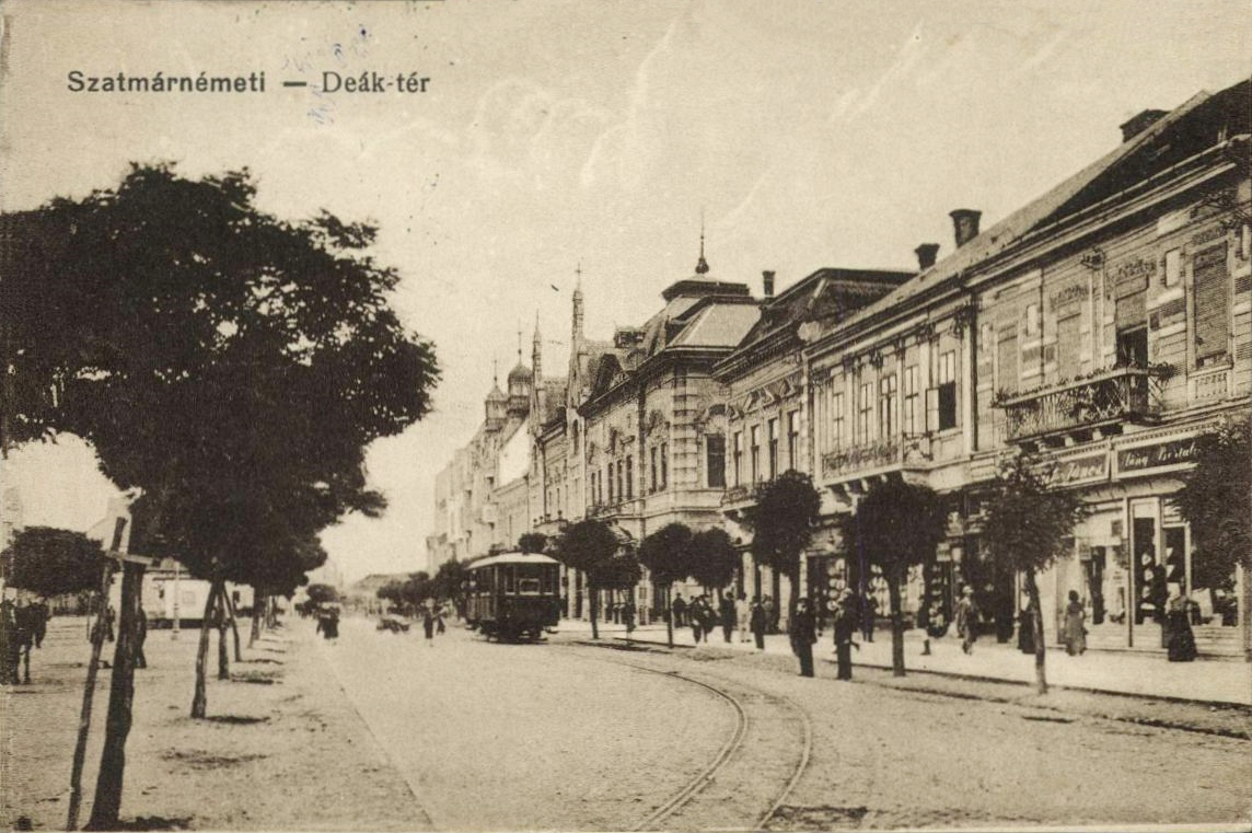 Szatmárnémeti, Deák tér régi képeslapon